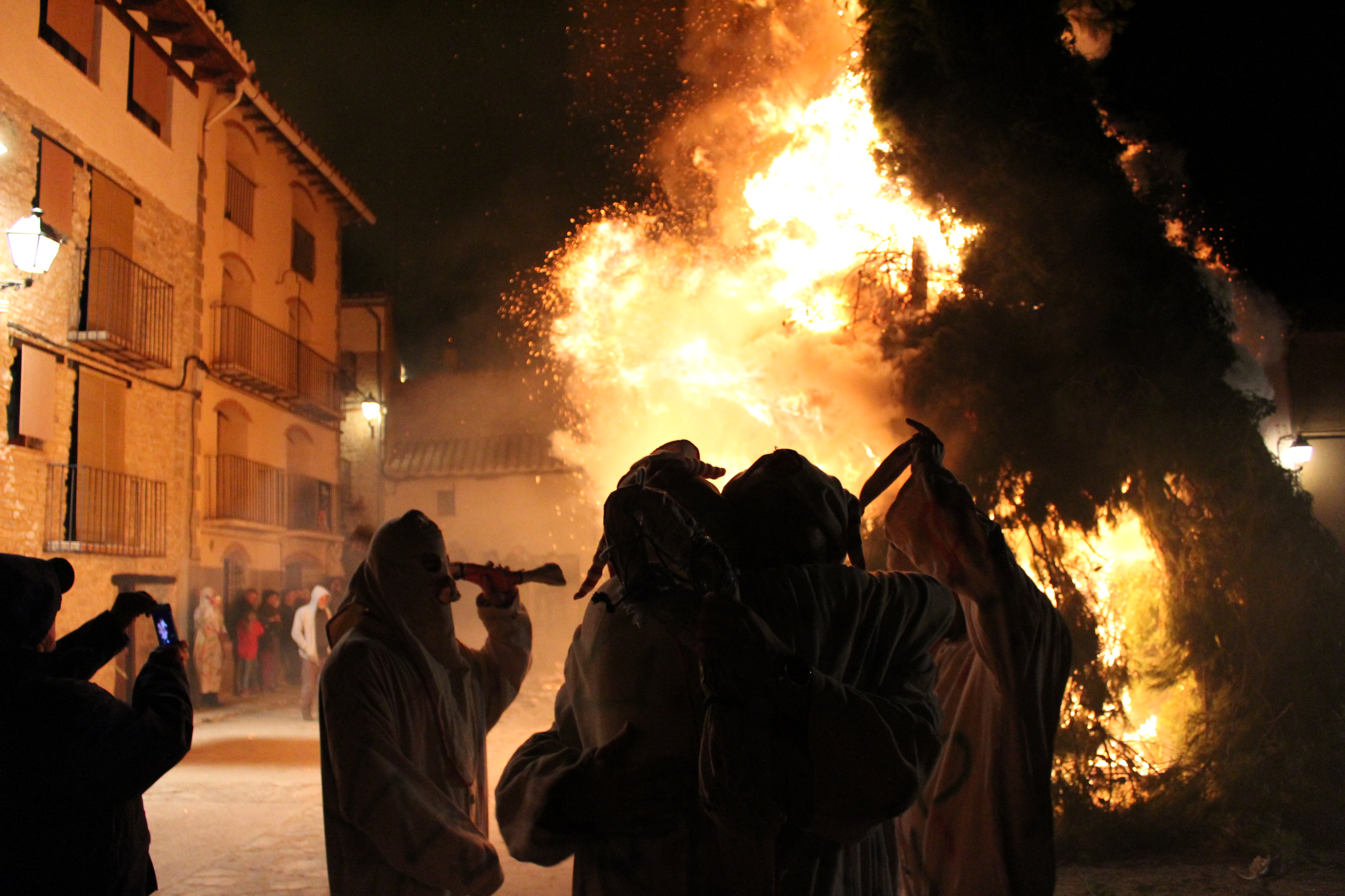 Botargues a la festa de Sant Antoni.